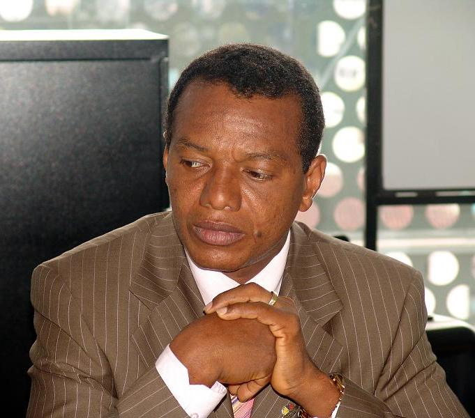 12 de noviembre de 2008